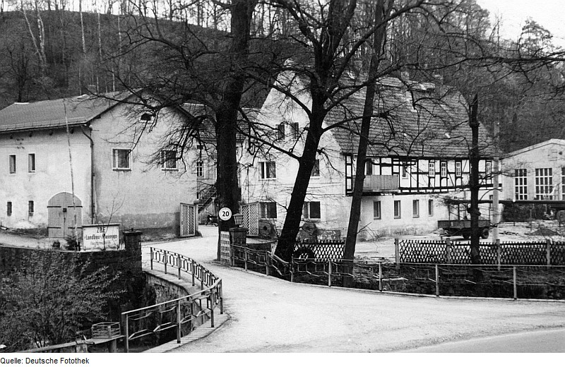 Original image description from the Deutsche FotothekTriebischtal-Roitzschen. Neidmühle, Außenansicht